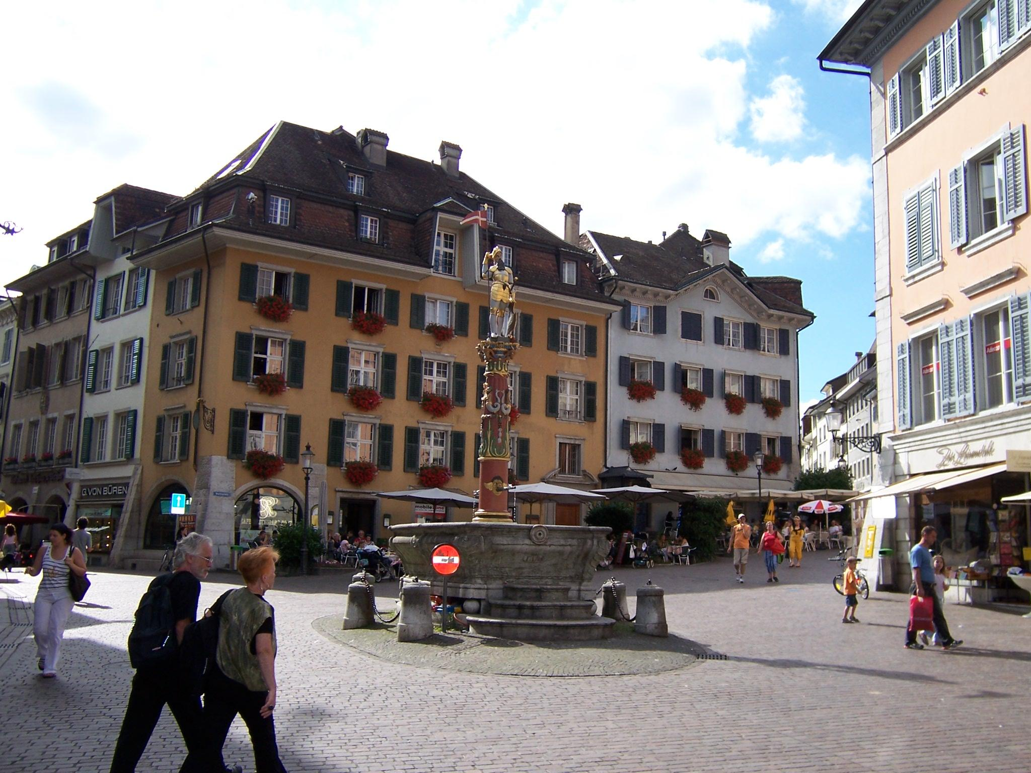 Marktplatz von Solothurn (Kanton Solothurn, Schweiz) mit St.-Ursus-Brunnen eigene Aufnahme vom 4. September 2006